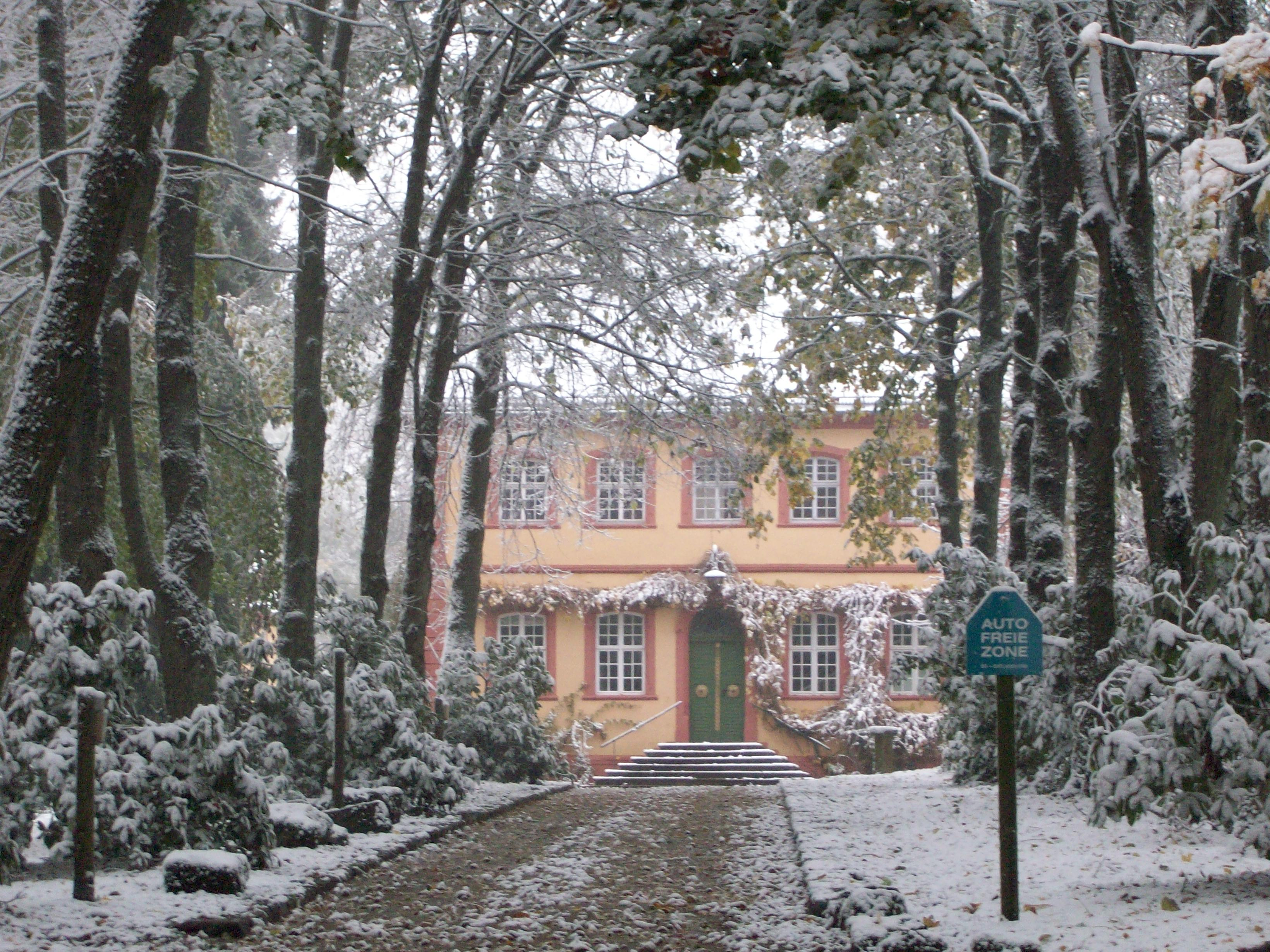 Blick zum Haupthaus des ehem. Jagdschlosses Krähberg, Sensbachtal